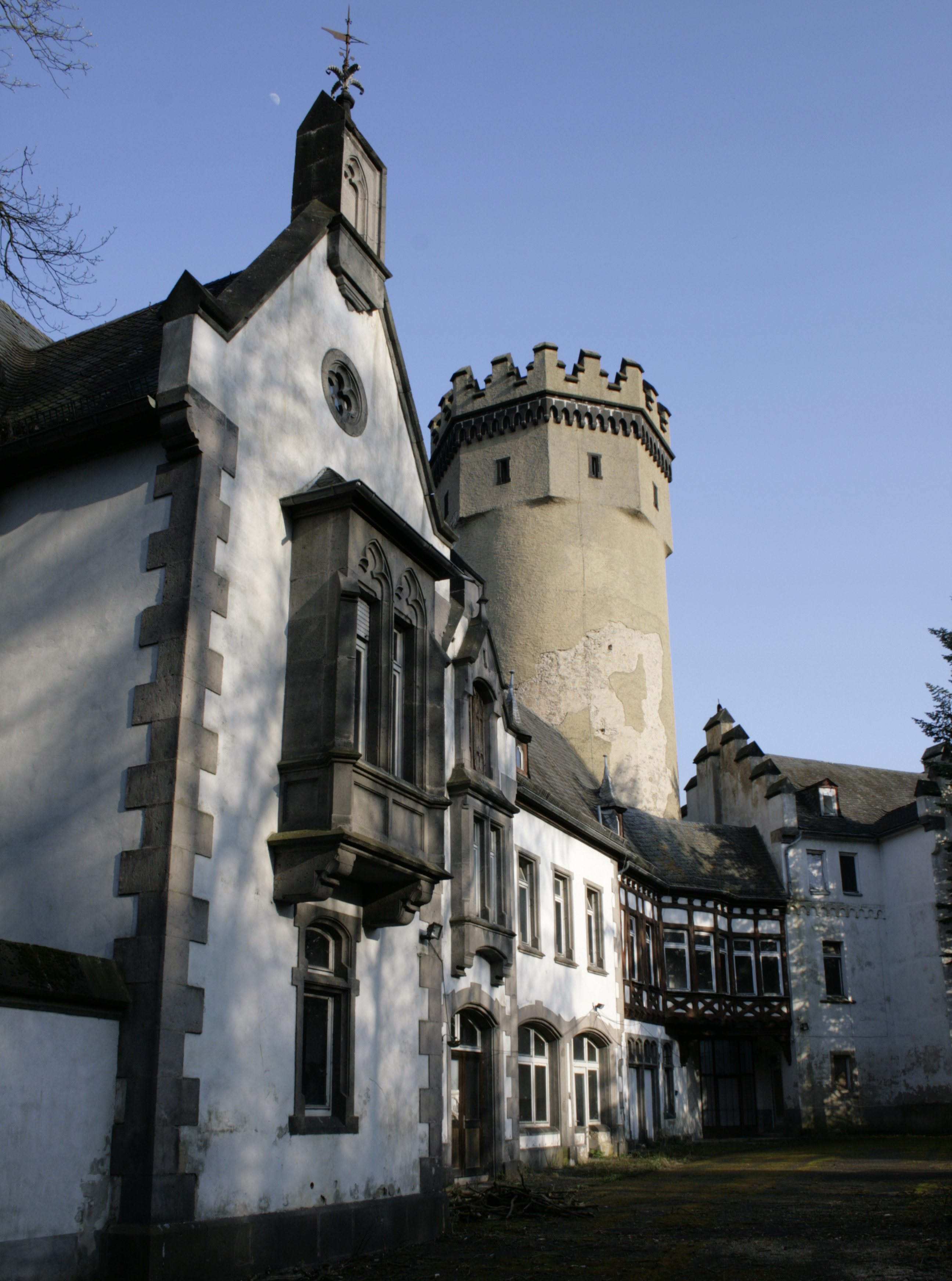 Hof der Burg Dehrn, Deutschland